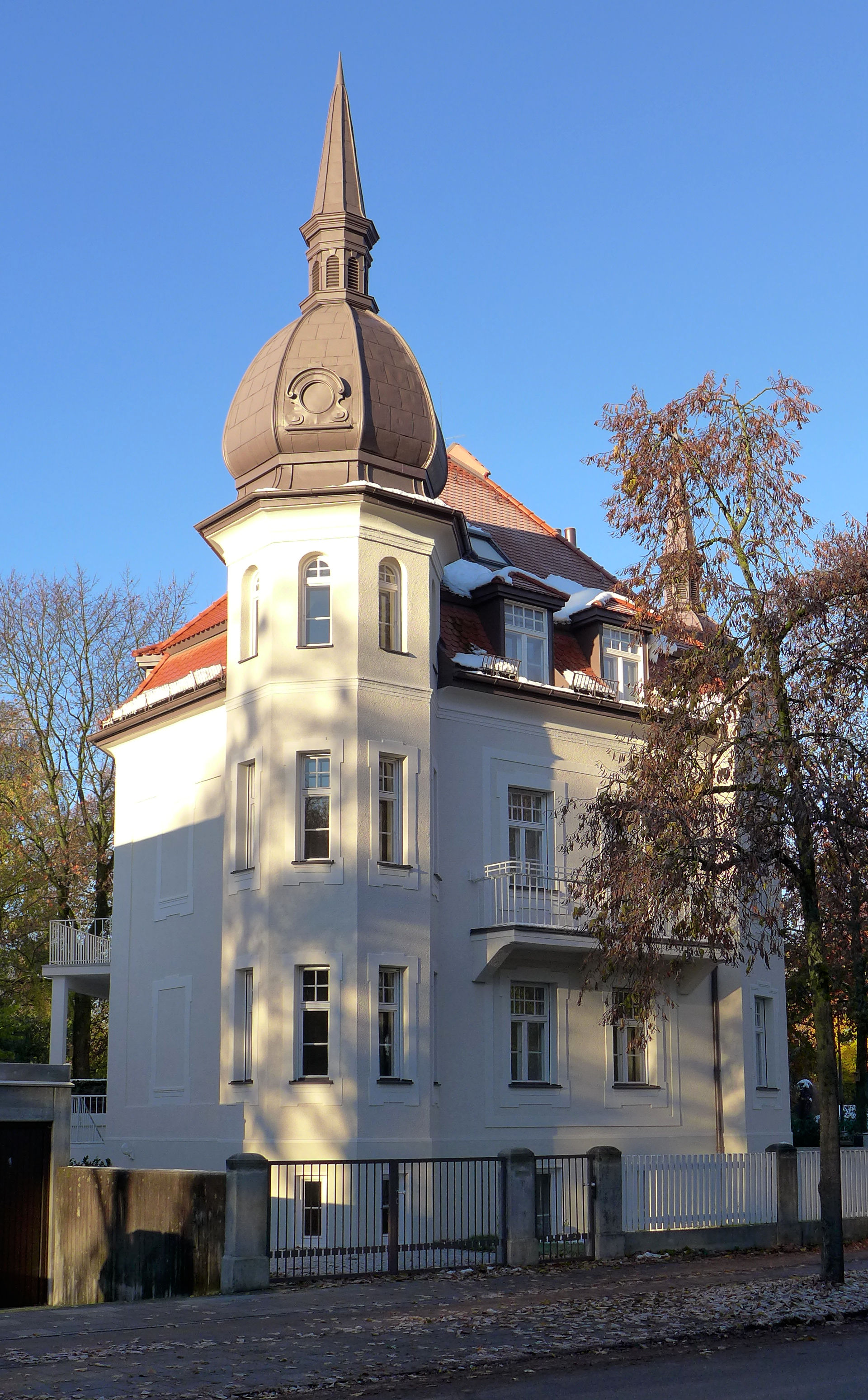 Rembrandtstr 1, München